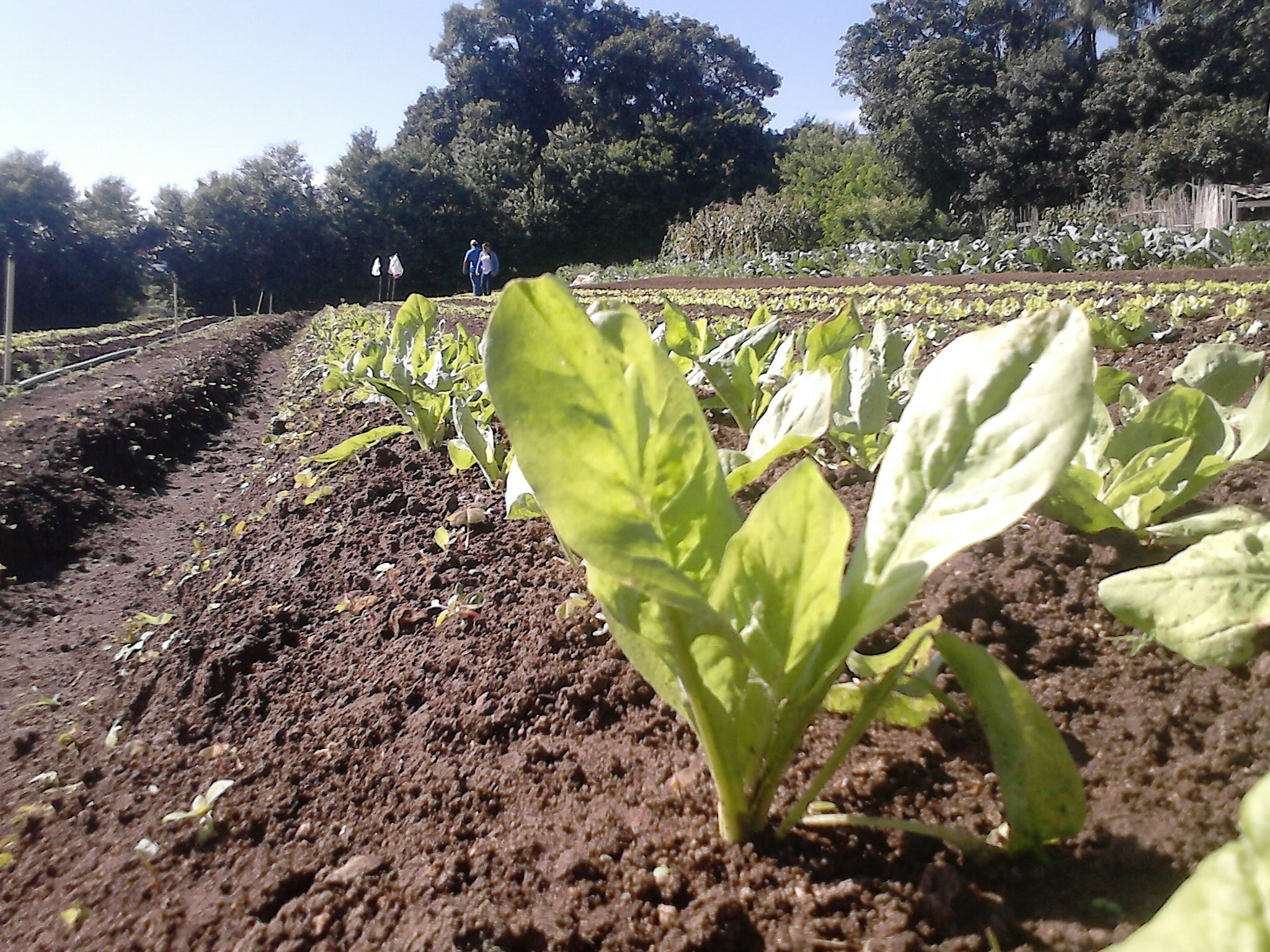 Cultivo de Almeirão